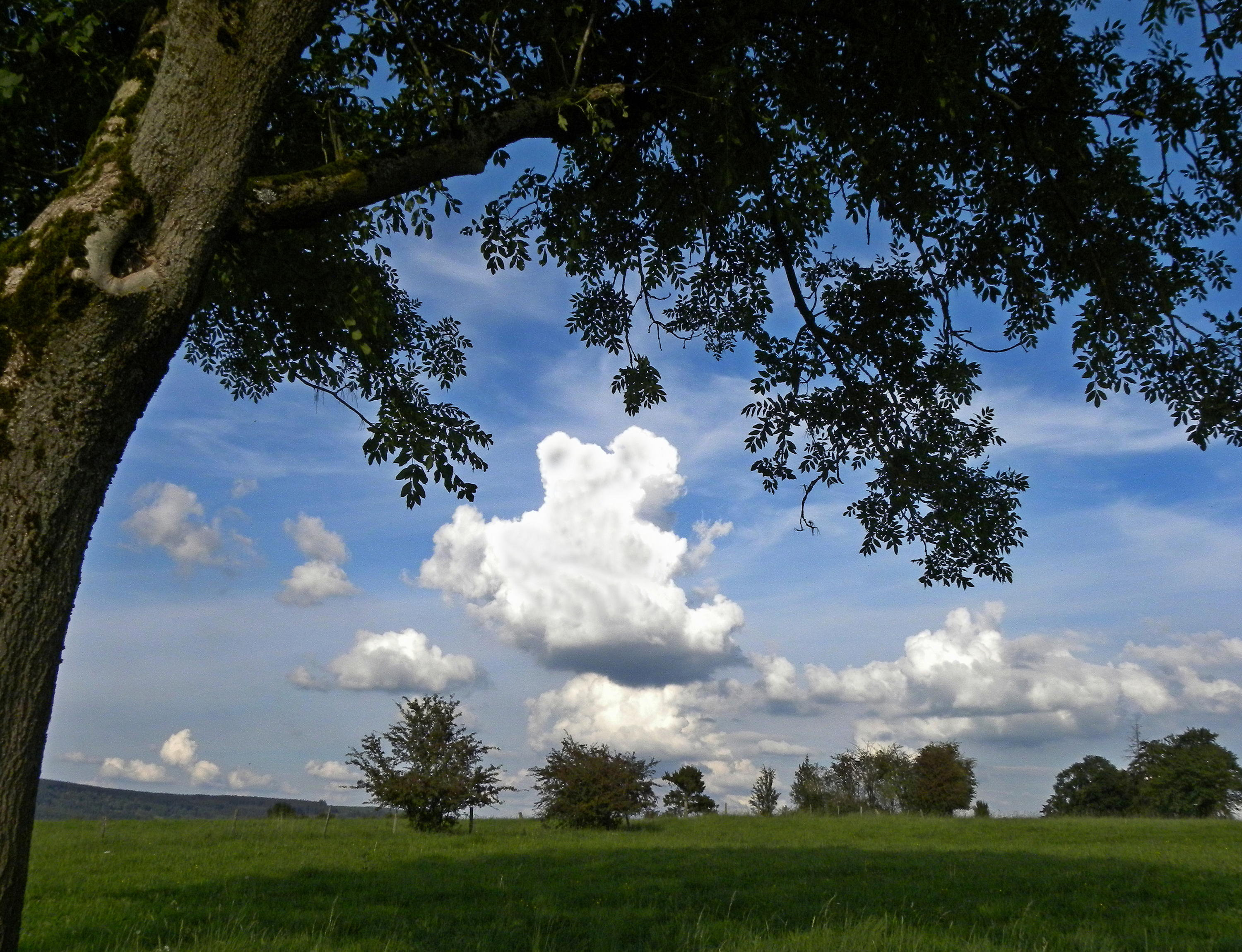 CUMULONIMBUS